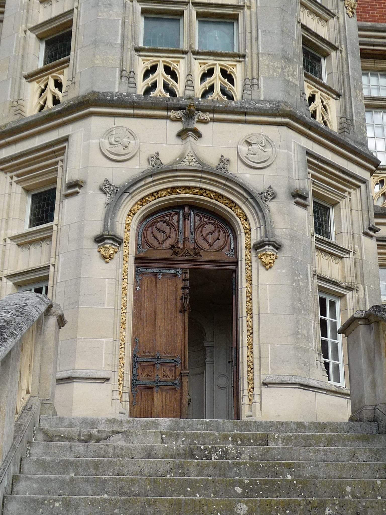 photo